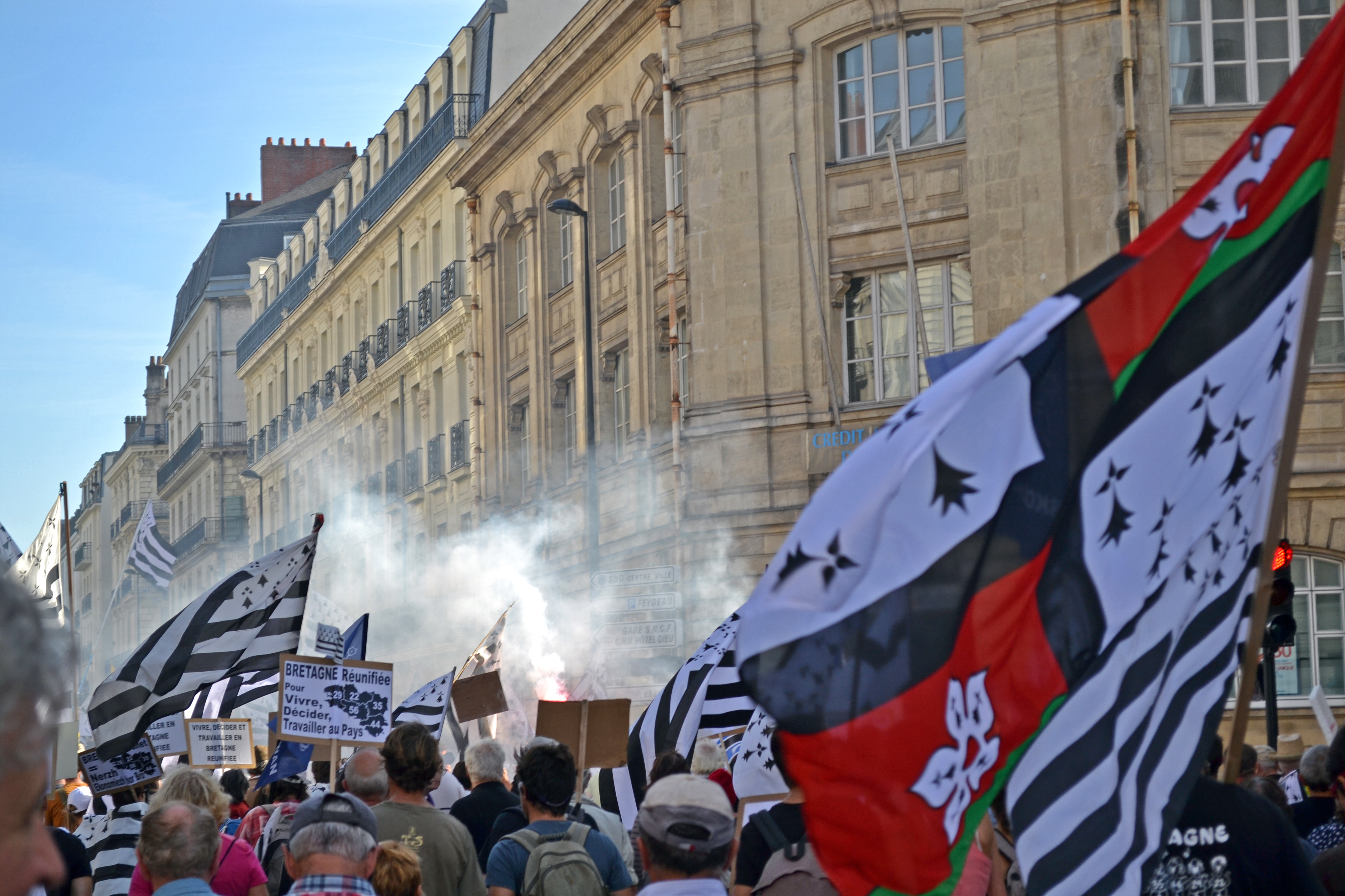 Des milliers de drapeaux bretons brandis à Nantes le 27 septembre 2014 pour célébrer la Bretagne entière et son projet d'avenir commun. La 3e grande manifestation populaire de l'année revendiquait une cohérence territoriale, économique, culturelle, pour que la péninsule plus que millénaire conserve son unité.